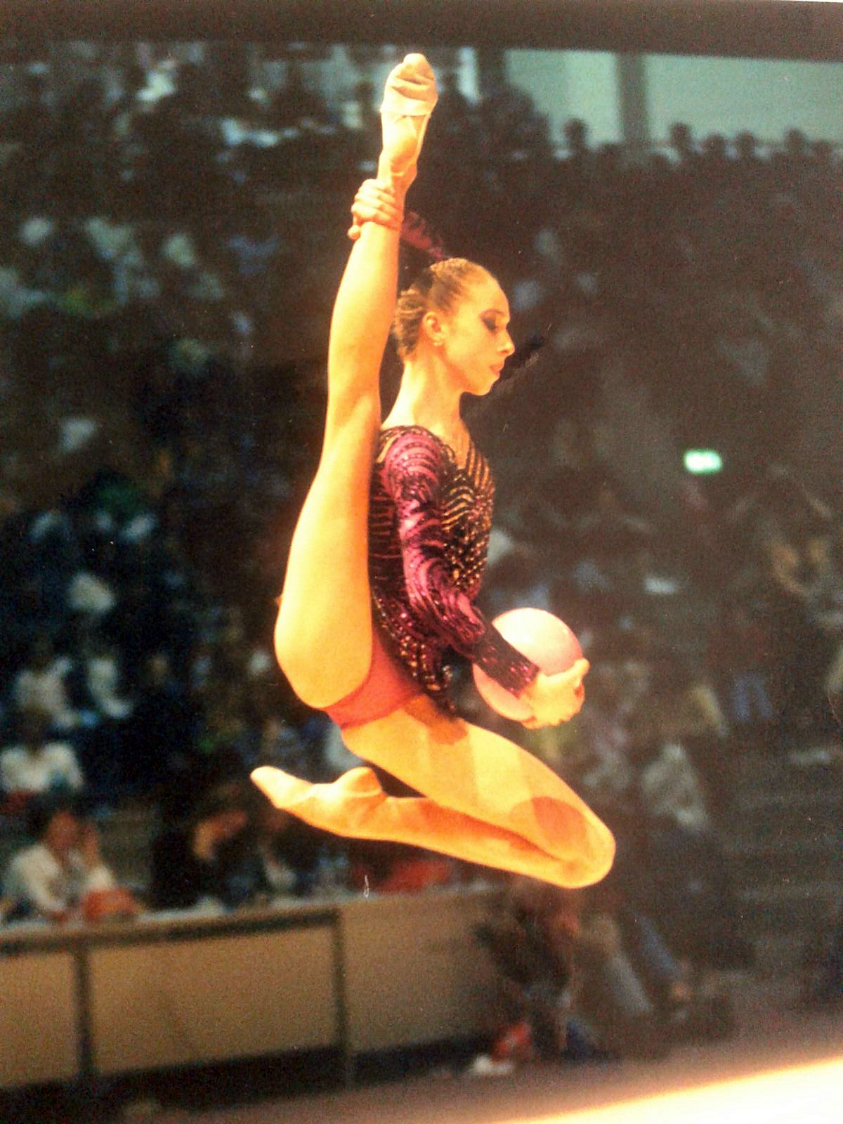 La gimnasta Inna Zhukova en el Campeonato de Europa de Gimnasia Rítmica de 2003 en Riesa.